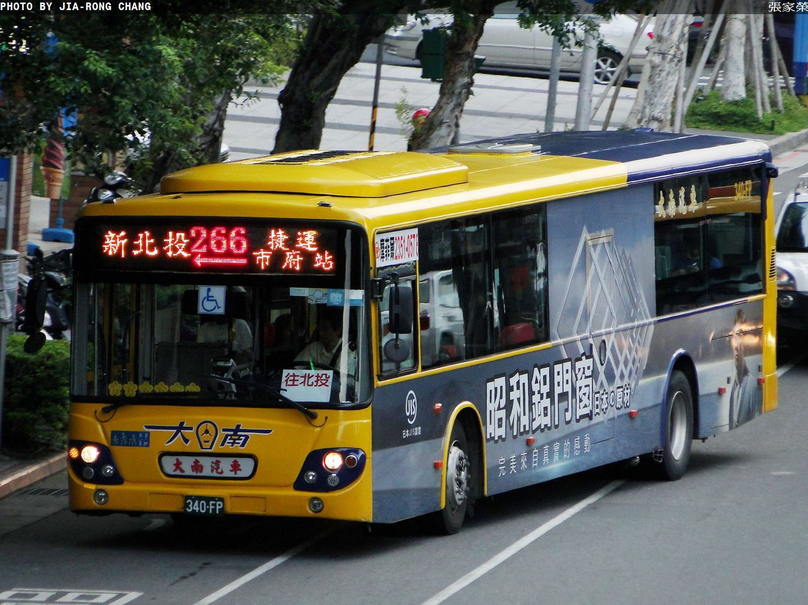 DAEWOO - BS120CN - 340-FP